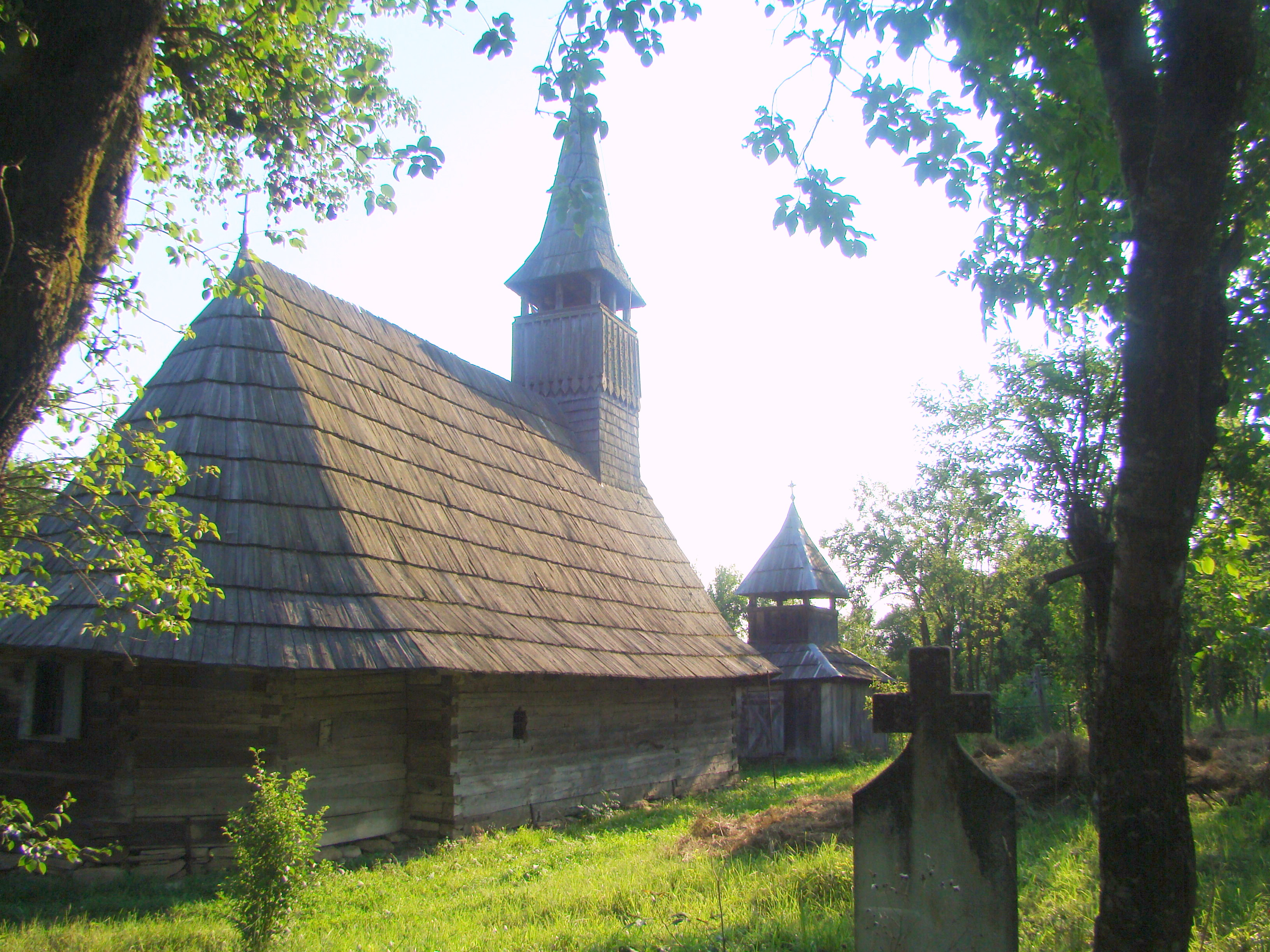 Biserica de lemn din Sălcuța